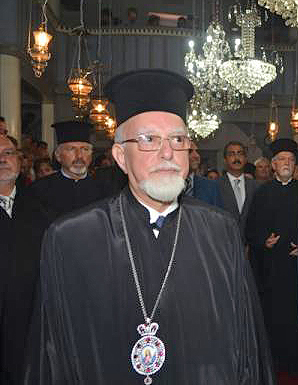 Кирилл (Драгунис)